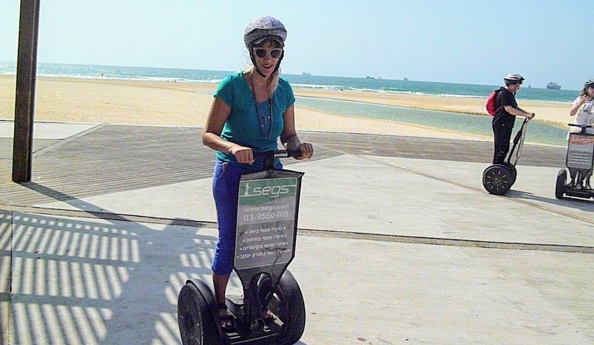 סיור סגווי באזור אשדוד